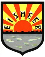 Emblème de la Jagdgeschwader 5